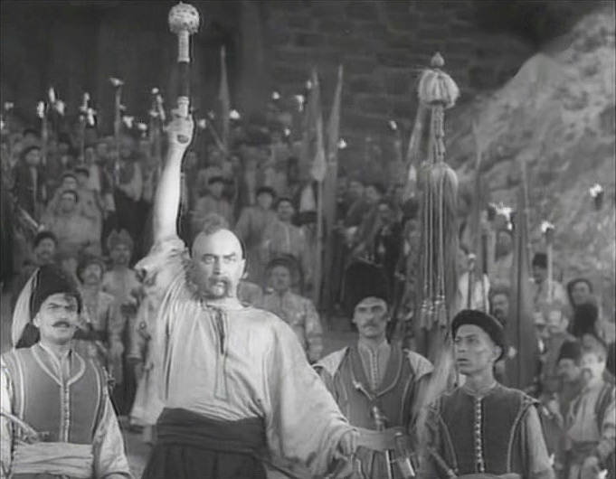 Кадр з фільму "Богдан Хмельницький"